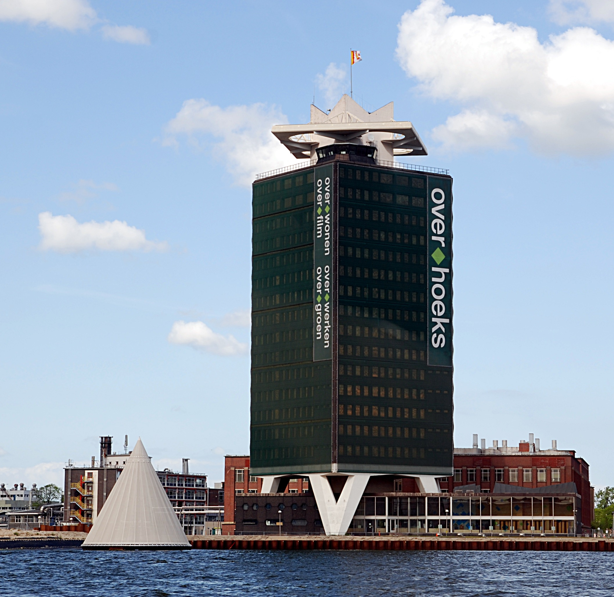 Shell Hochhaus, Hauptsitz der Gesellschaft in Amsterdam